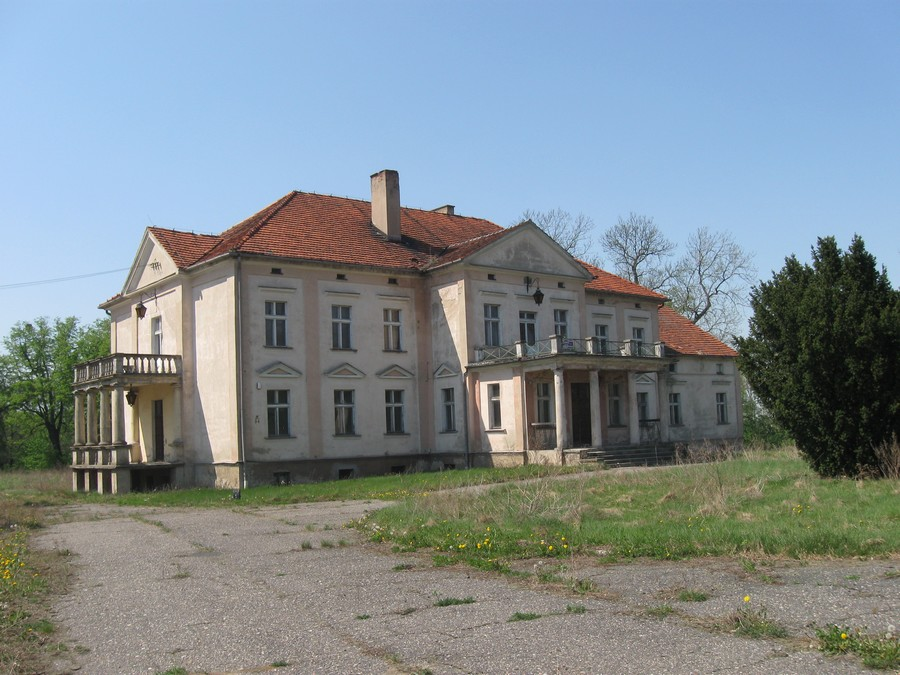 Szlachcin - zespół pałacowy: pałac z pocz. XIX w. (zabytek nr 1537/A)